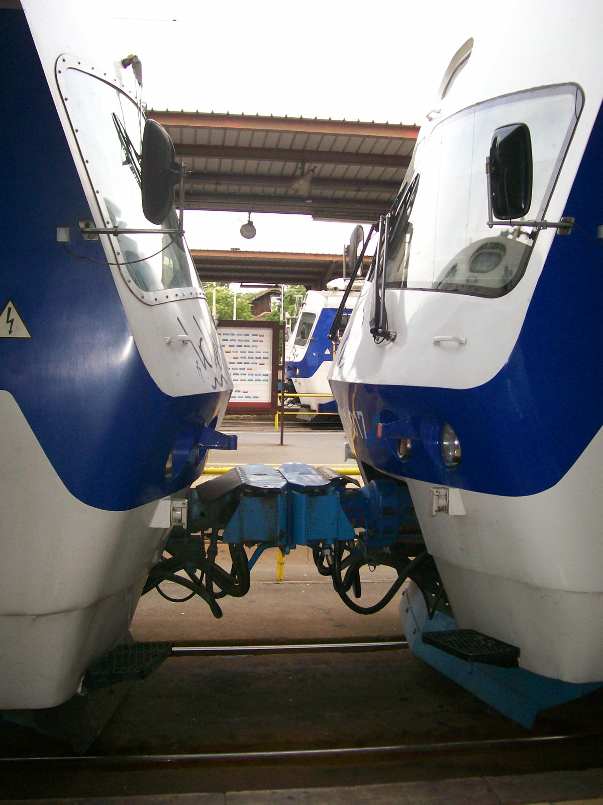 Dva EMV HŽ serije 6111 u sprezi (spojeni)